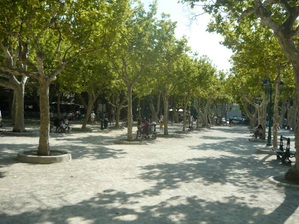 Náměstí v St.Tropez